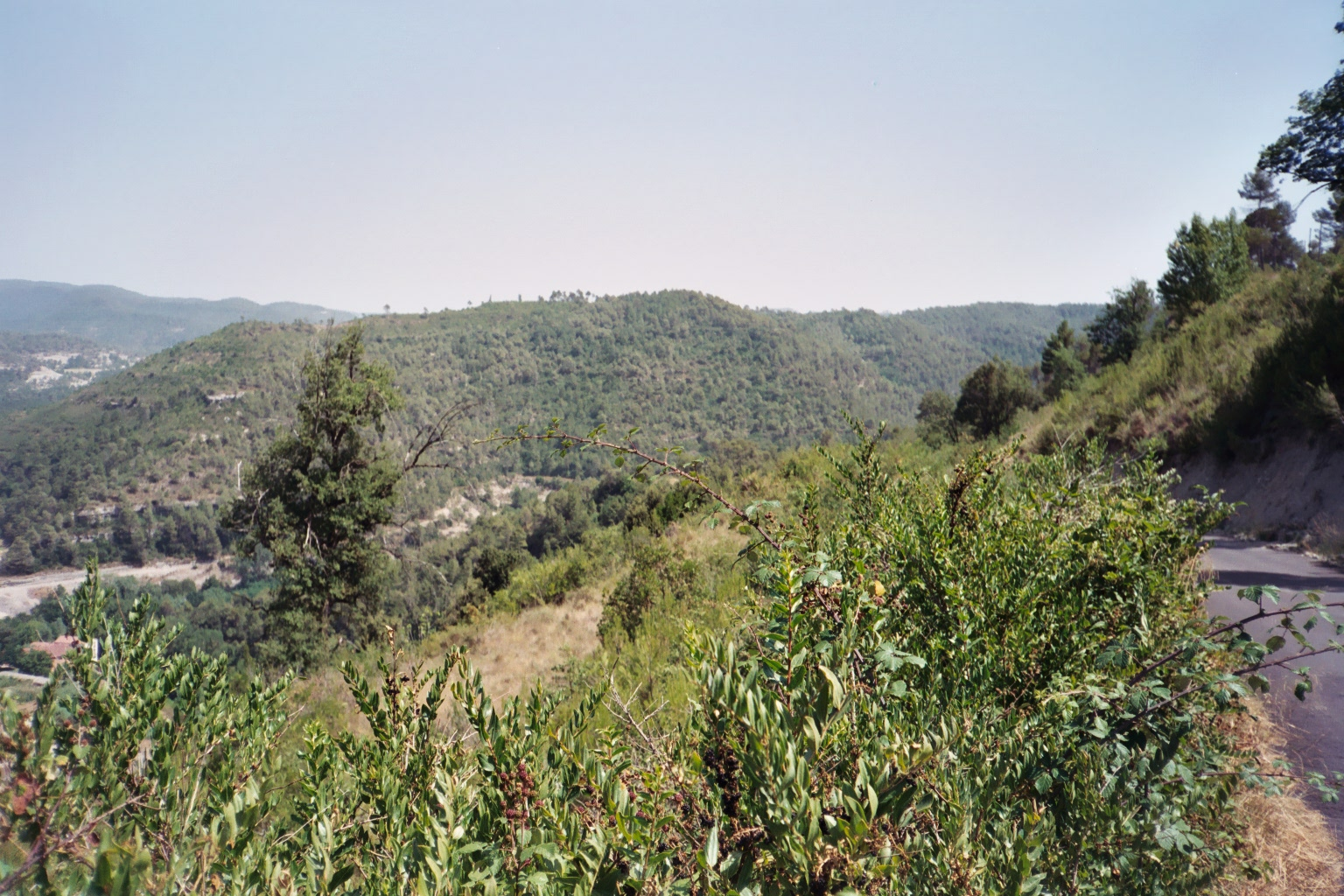 Serrat de les Abrines (Calders, Moianès)